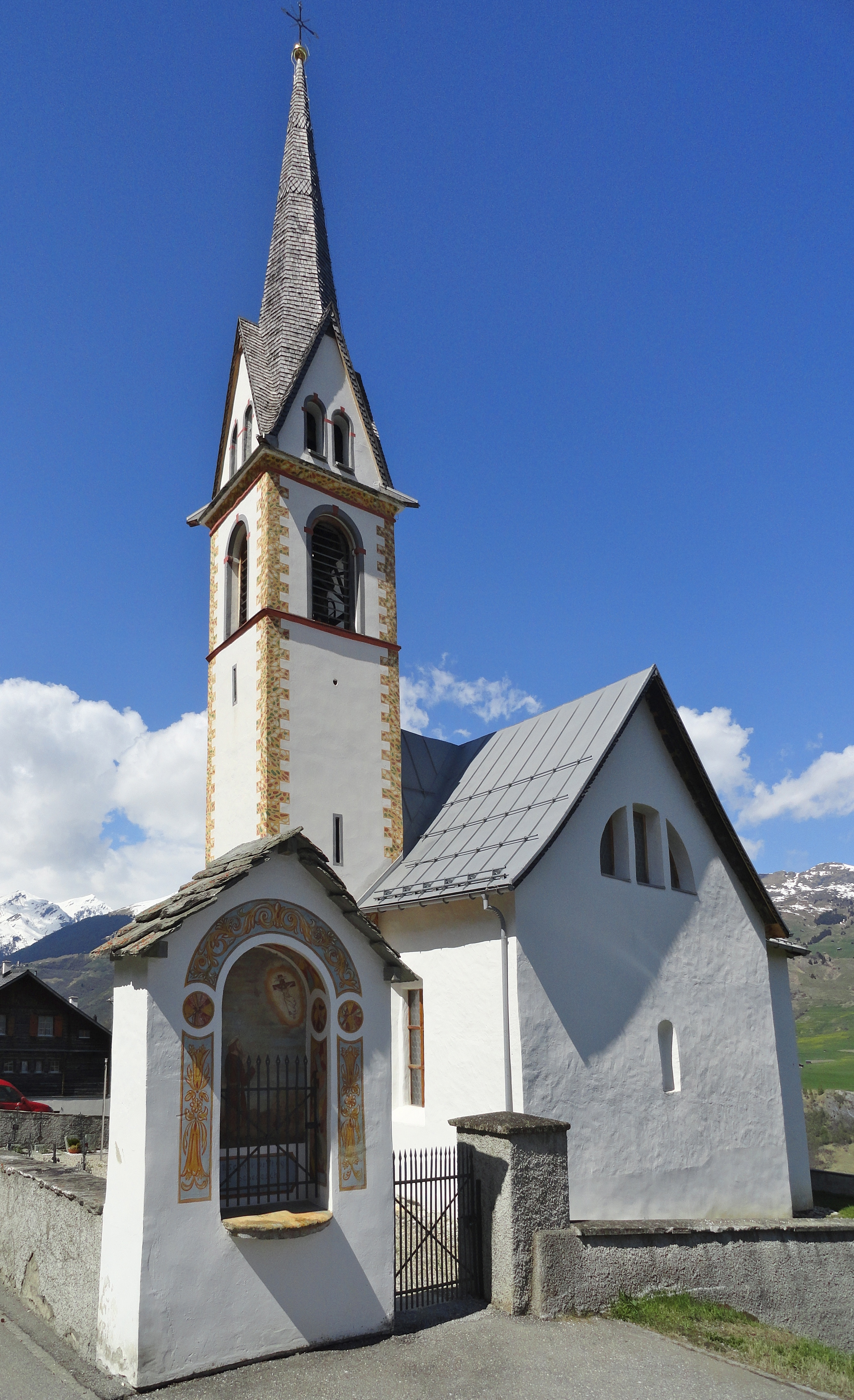 Katholische Kirche Camuns: Aussenansicht